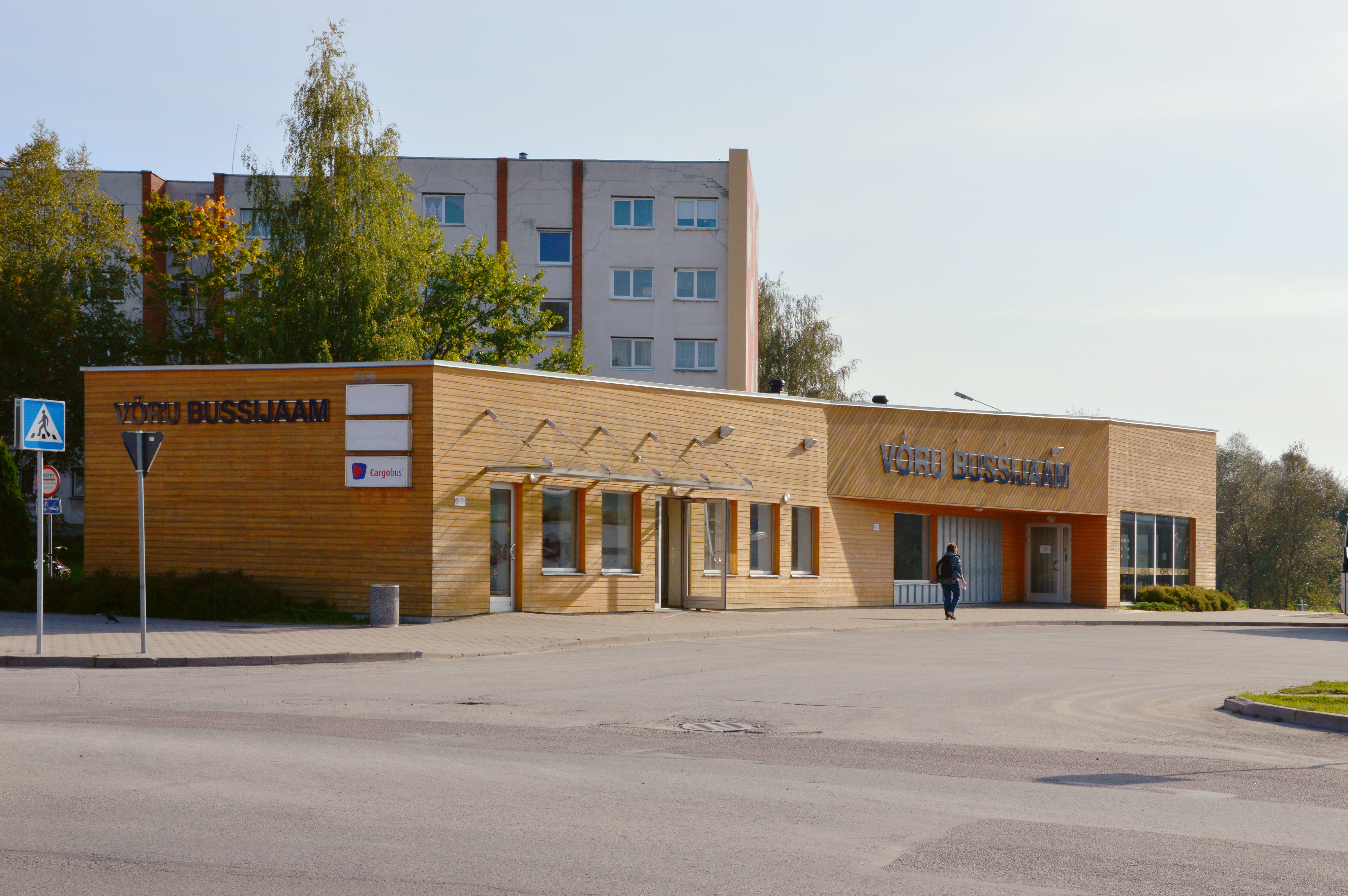 Võru bussijaam